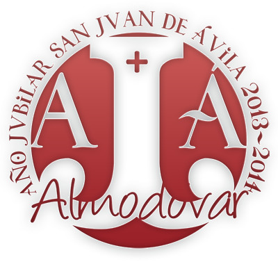 El logo del Jubileo combina la letra “jota” y la “a”, para leer de izquierda a derecha o de derecha a izquierda, tanto Año Jubilar como Juan de Ávila. Además, las dos jotas, aunque estilizadas, conforman un ancla. Esta es uno de los símbolos más antiguos utilizados por el cristianismo para hablar de la fe, siendo una imagen habitual en los enterramientos cristianos primitivos. La fe está anclada y es fuerte porque «hemos conocido el amor», ya no cabe el miedo, sino la fuerza que nos regala Cristo. En este mismo sentido, el Año Jubilar se enclava dentro del Año de la fe, es nuestra forma particular de vivirlo, con la gracia jubilar. Será san Juan de Ávila, que nos ha «enseñado» la fe con sus palabras de manera tan eficaz que la Iglesia lo ha proclamado Doctor, quien nos acompañe a conocer y vivir la fe. Él nos muestra a Cristo, él nos «enseña» al Salvador. El «ancla» formada por las dos jotas está presidida por la cruz. Es el Señor quien lo ha hecho, en quien creemos, y su cruz la que nos salva. La cruz sujeta nuestra ancla, hace que la fe esté anclada, que sea fuerte. En cuanto a la tipografía, se ha utilizado «Vítor», de la Universidad de Salamanca. No solo por la historia del santo allí, sino por su proclamación como Doctor. Al conseguir este grado, tanto los estudiantes salmantinos, como los de Sevilla y Alcalá, pintaban «vítores» en las paredes, utilizando sangre de toro, que le daba el color rojo oscuro y además los hacía perdurar. La tipo aquí es un «guiño» a su Doctorado, motivo por el cual se solicitó el Jubileo y por lo que el Santo Padre lo concede. El color es el propio de los «vítores»; además, se buscaba un tono que diera al logotipo diera nobleza y elegancia. Y por último: Almodóvar, con una tipografía claramente distinta, que evoca el tiempo actual, indicamos el lugar físico en el que se celebra el Jubileo y el lugar de nacimiento del santo.